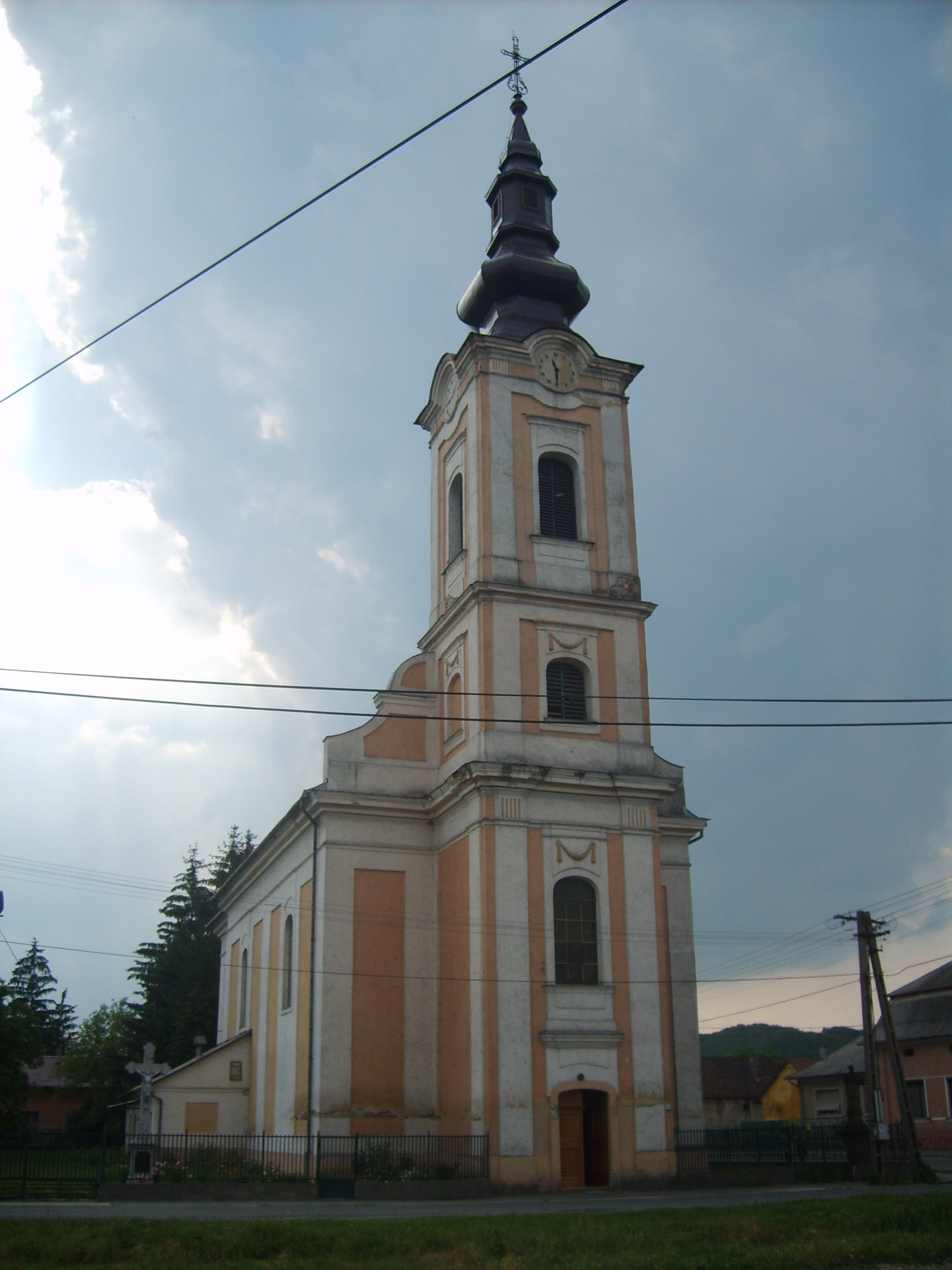 Sajóvárkonyi Szent Miklós római katolikus templom